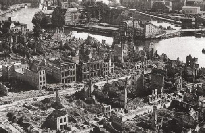 Durch Luftangriffe und Artilleriebeschuss zerstörte Innenstadt von Danzig